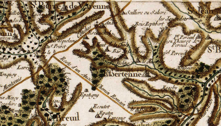 Origine : Collection personnelle Description : Vue ancienne de la commune d'Essertenne 71510